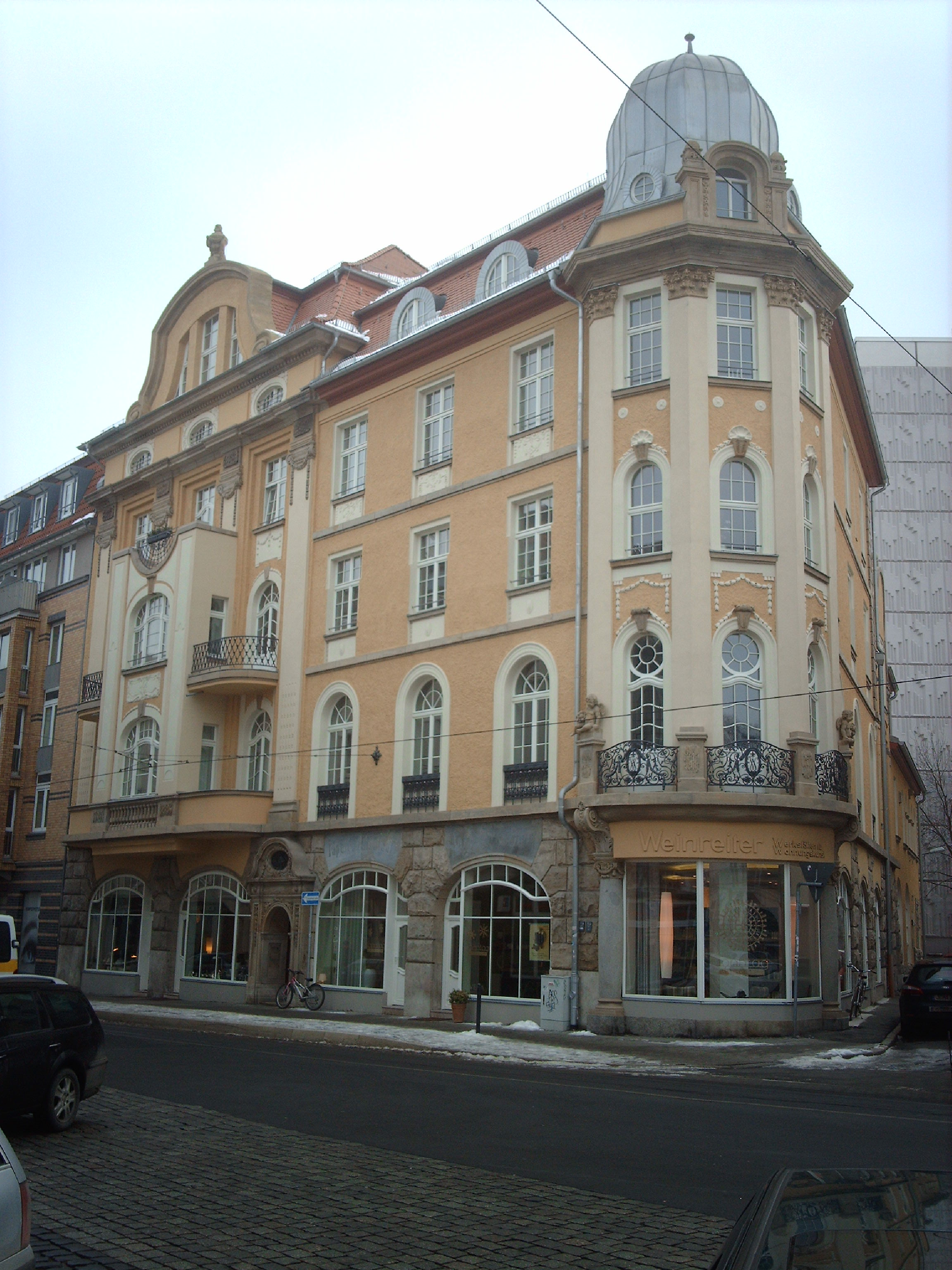 Gebäude in der Neuwerkstraße 29 in Erfurt, wo sich zu DDR-Zeiten die Erfurter Ateliergemeinschaft traf.